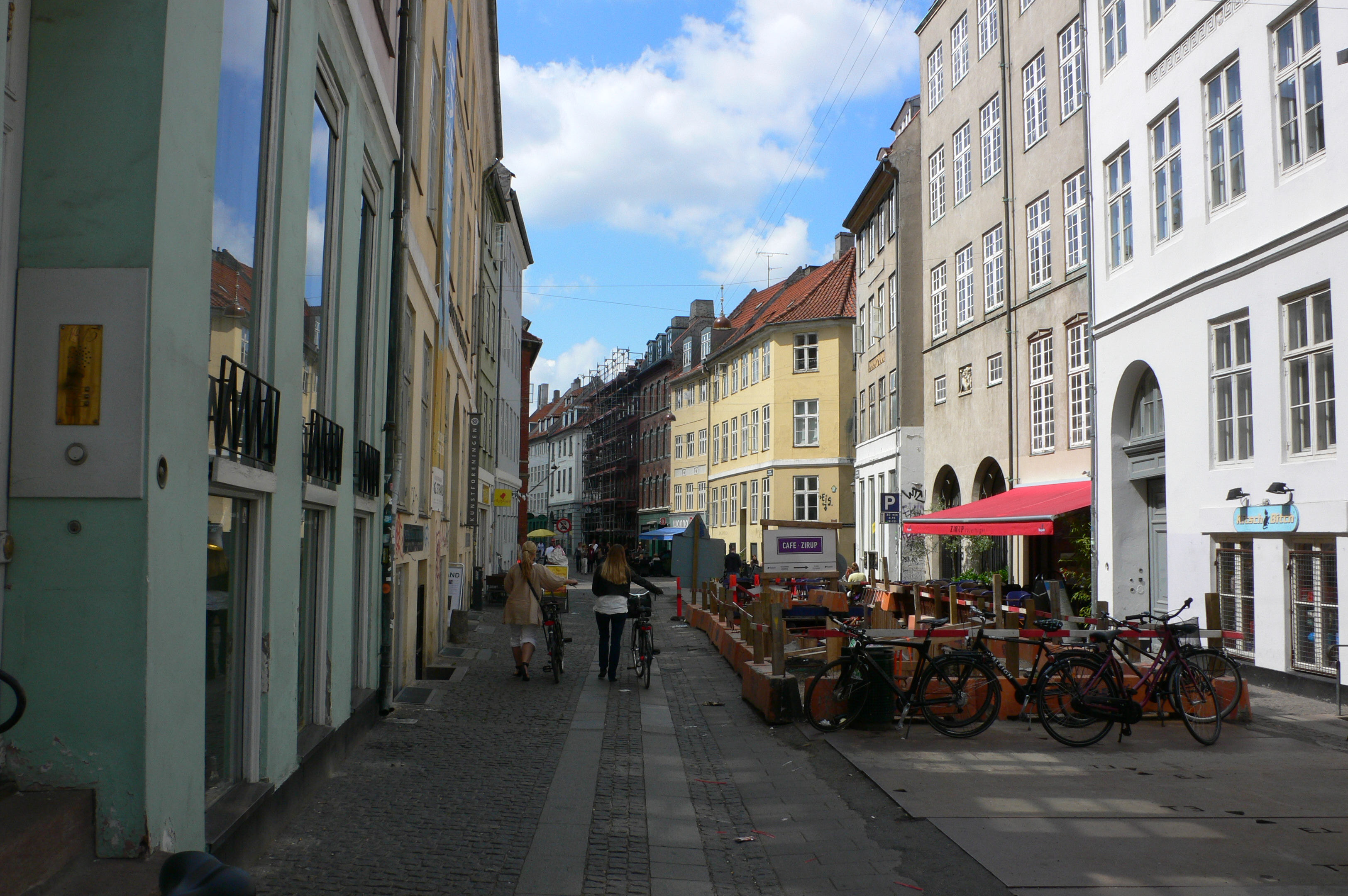 Læderstræde in Copenhagen, Denmark